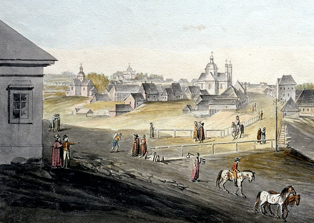 Беларуская (тарашкевіца): Віцебск (Viciebsk), Заручаўе (Zaručaŭje)